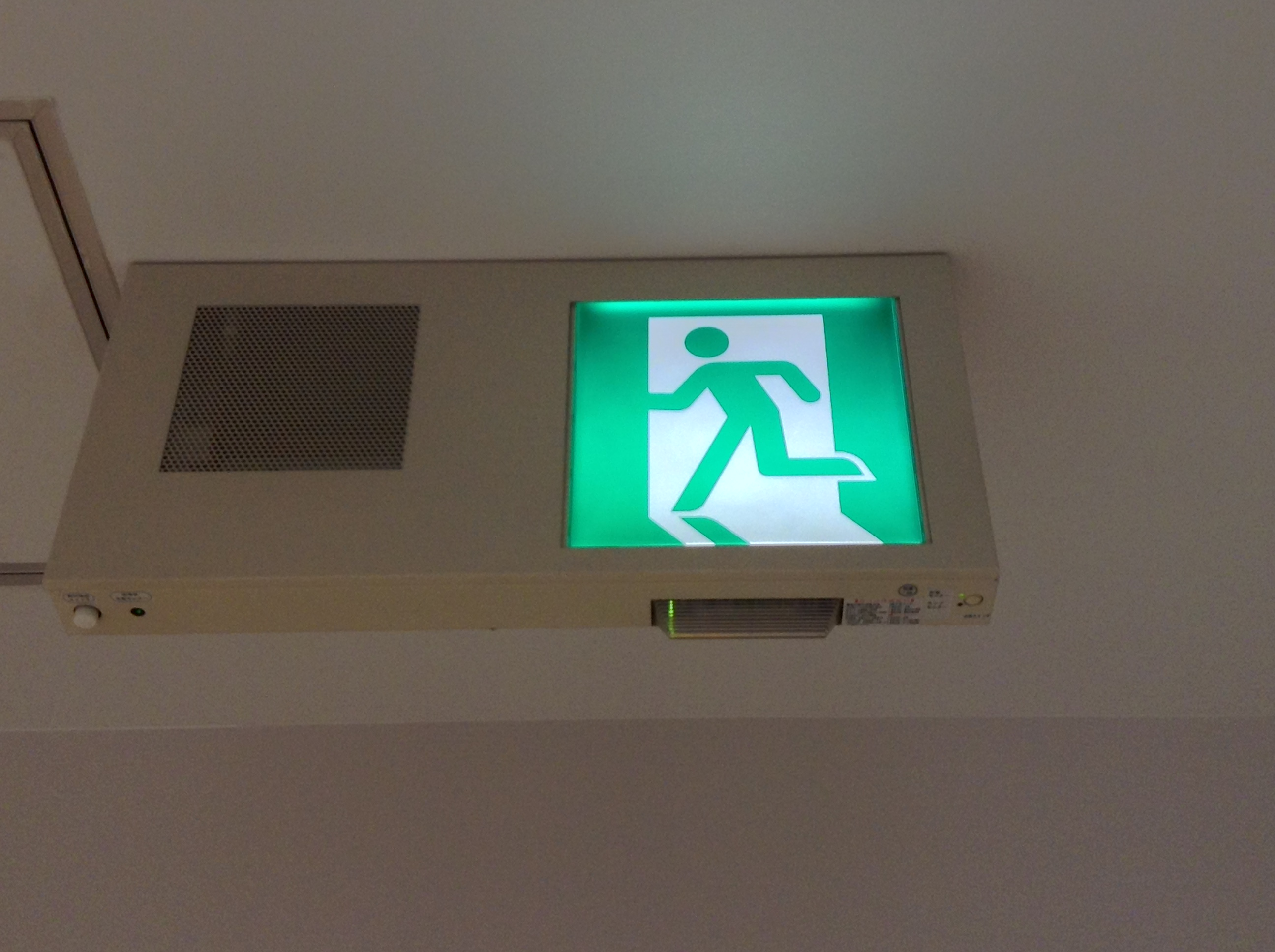 非常口誘導灯 イトーヨーカドー Ario 八尾ショッピングモール 内の非常口前通路 にて撮影